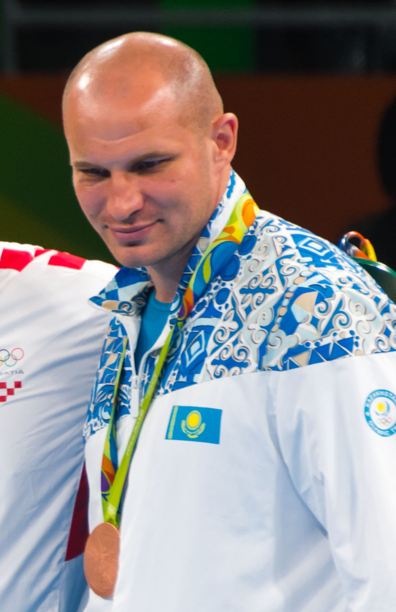 Pódio da categoria peso superpesado acima de 91kg masculino, Jogos Olímpicos Rio 2016. Ouro: Tony Victor James Yoka/FRA. Prata: Joe Joyce/GBR. Bronzes: Filip Hrgovic/CRO e Ivan Dychko/KAZ.